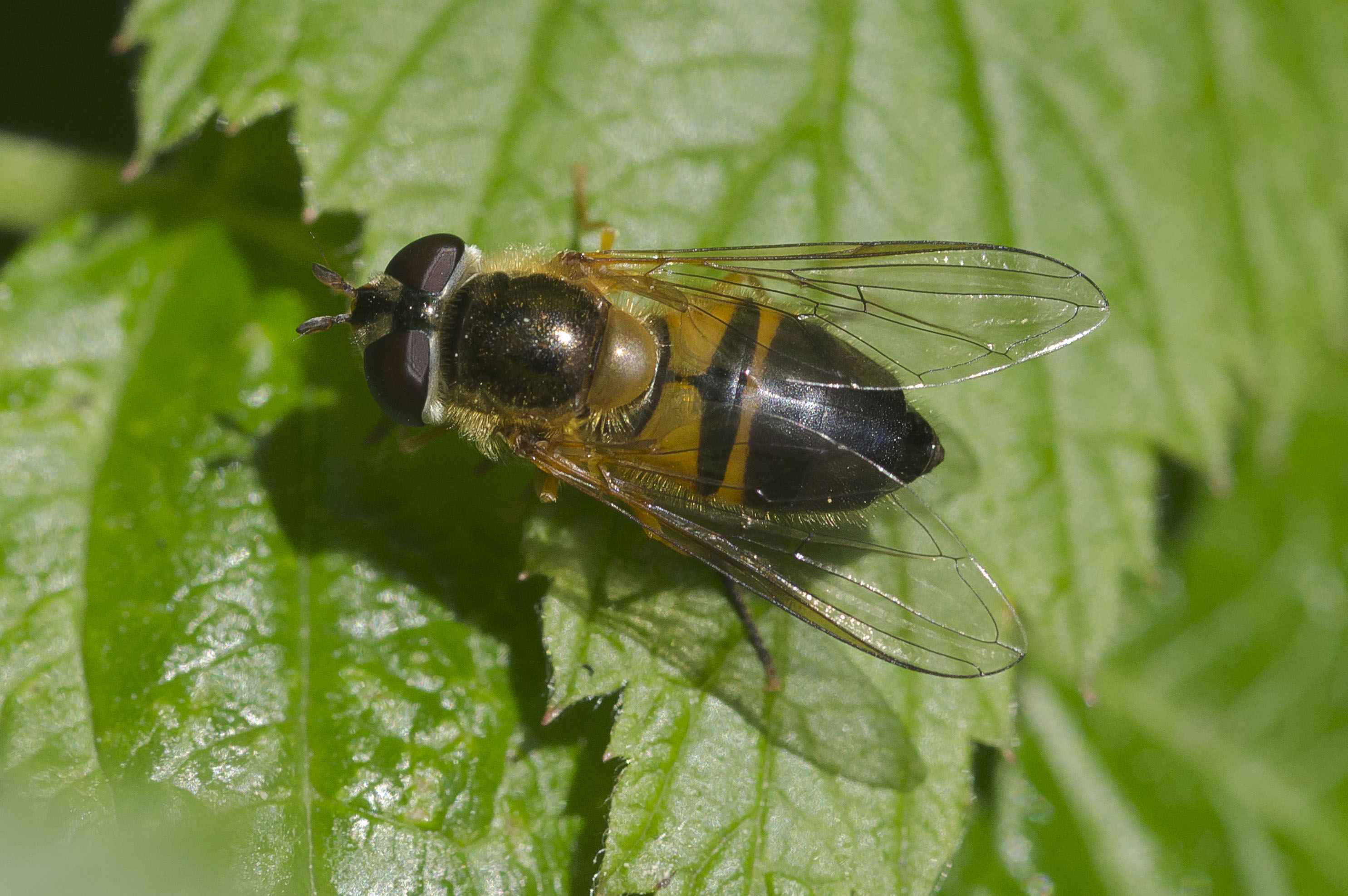 Epistrophe eligans (w), Stuttgart. Dank an die Mitglieder von Entomologie.de für die Bestimmung.